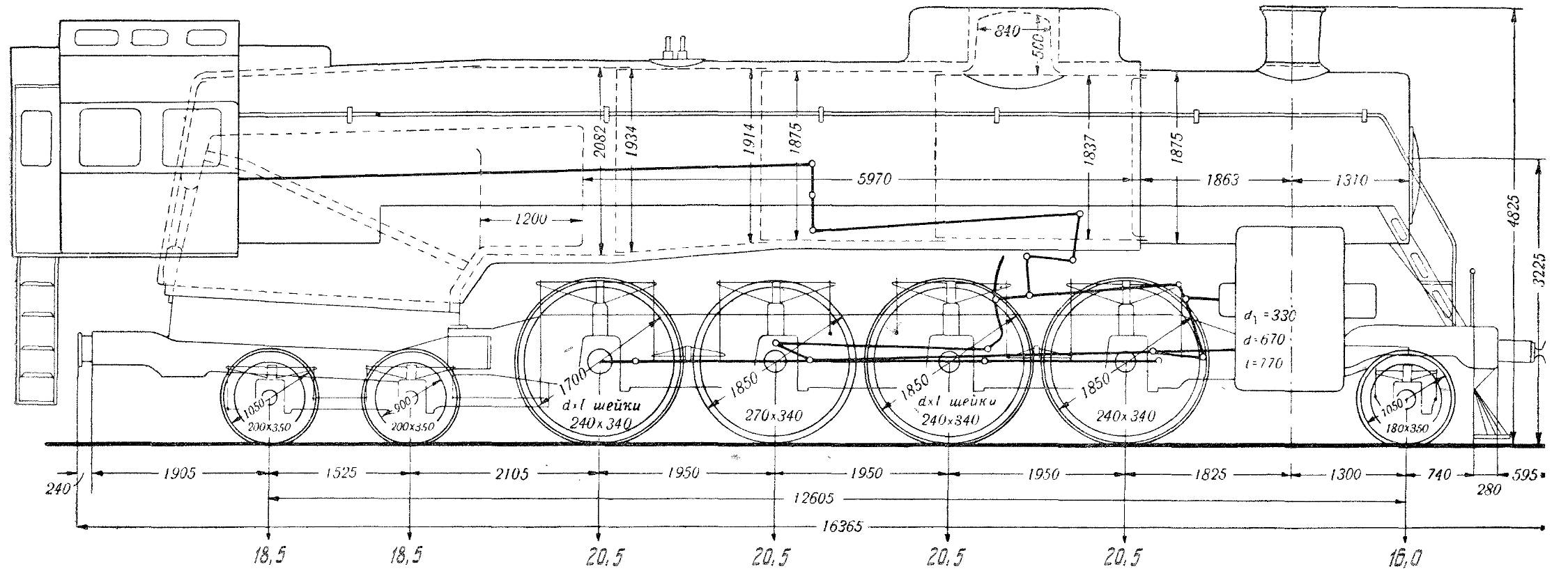 Основные размеры паровоза ИС20 выпуска 1936 - 1940 гг.